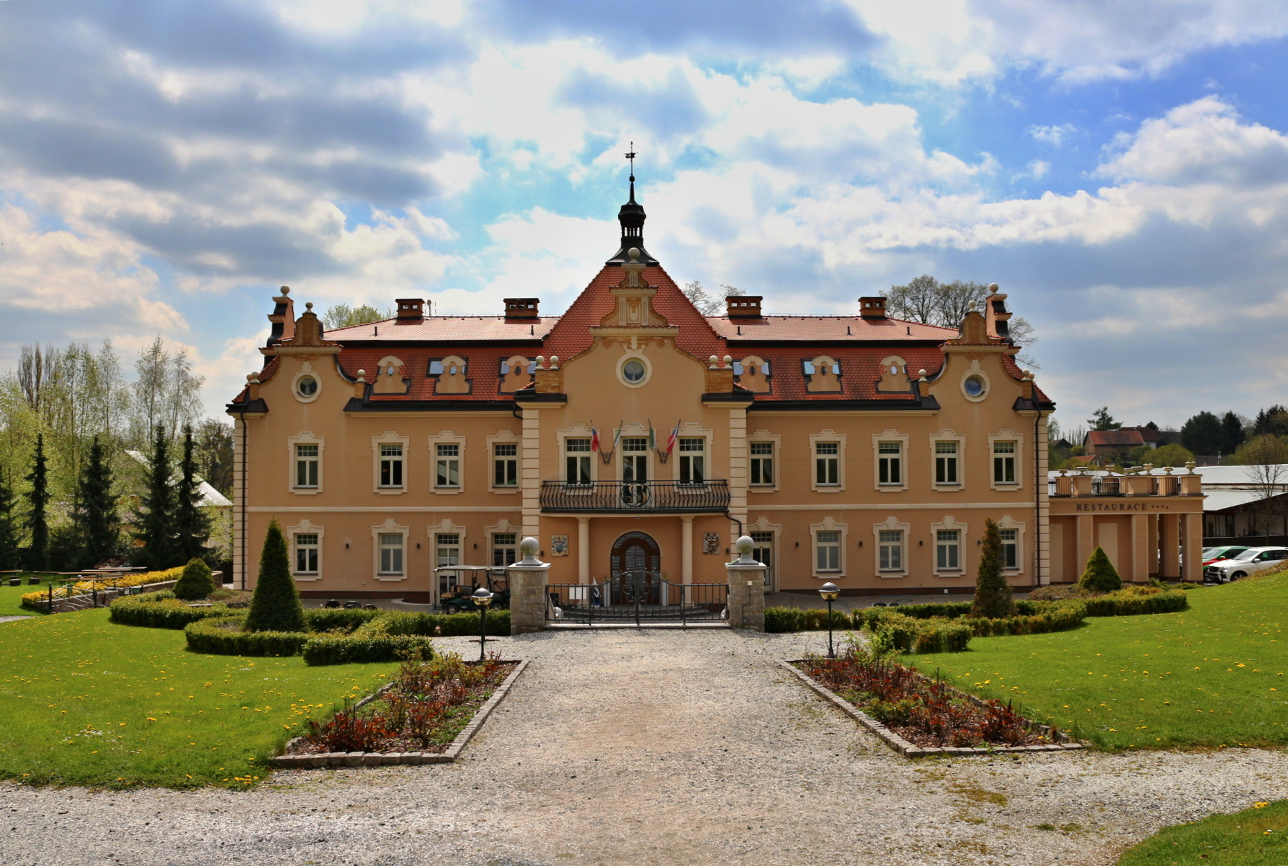 Zámek Berchtold